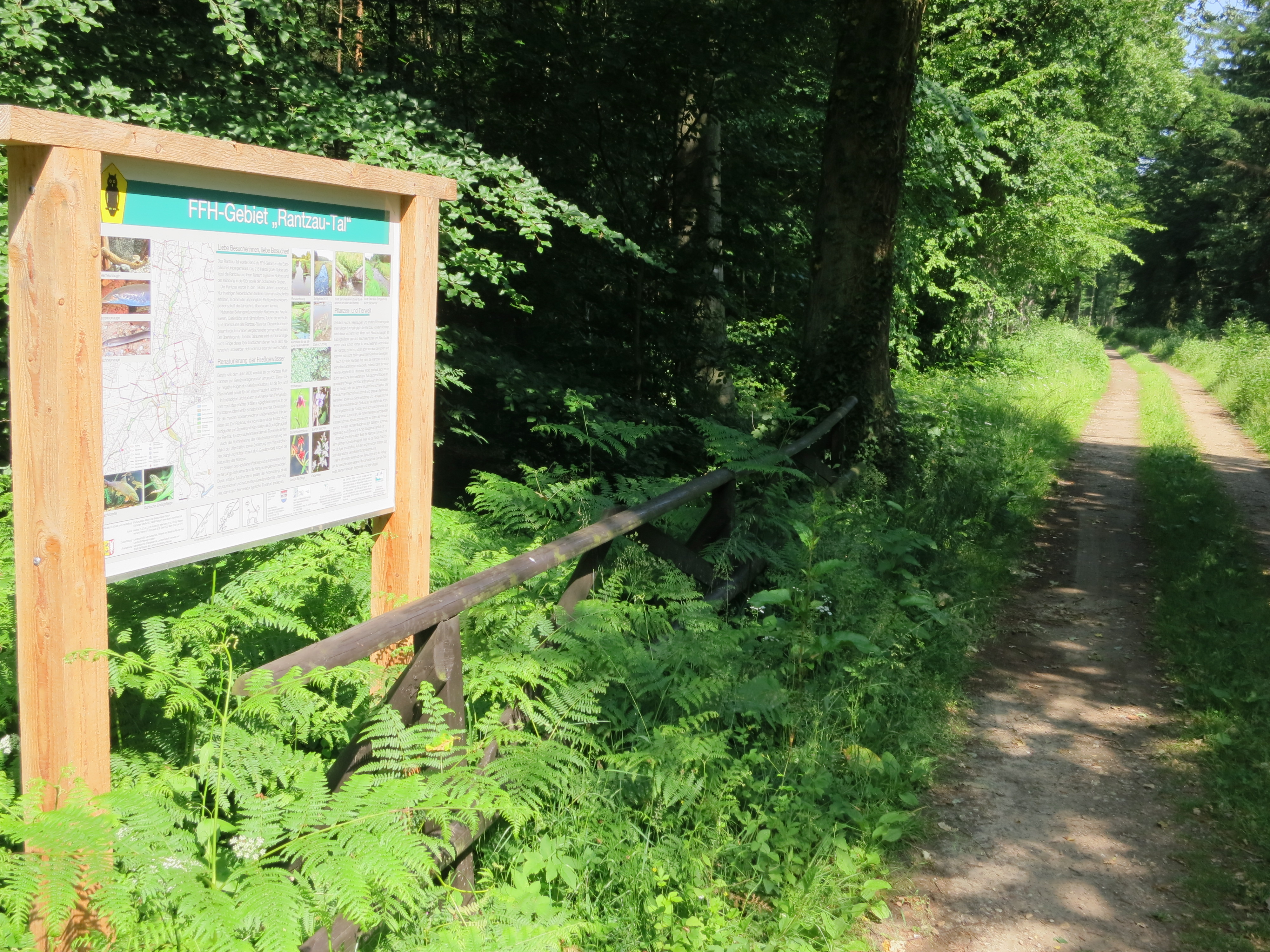 Informationsschild zum FFH-Gebiet „Rantzau-Tal“ am Schmabeker Weg zwischen dem Itzehoer Stadtforst "Lübsches Gehölz" (links) und dem Kreisforst Schmabek (rechts) an der Überquerung des Lübschen Baches